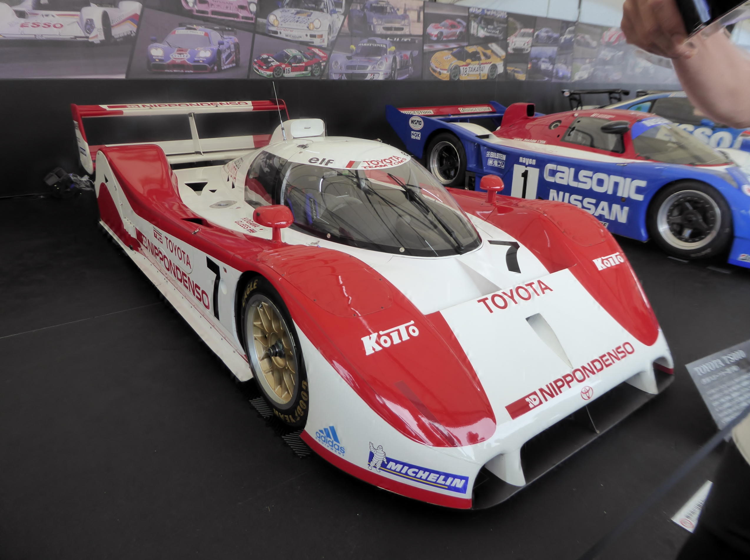 1992年スポーツカー世界選手権に出場した7号車トヨタ・TS010を撮影。